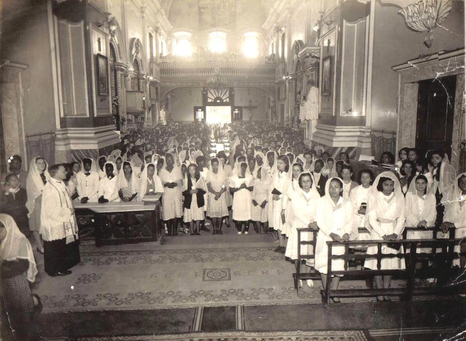 Missa realizada nos anos 50 na Igreja Matriz de Barra Mansa - RJ.